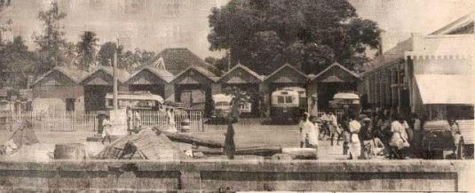 ബസ് സ്റ്റേഷനും കാണാം.